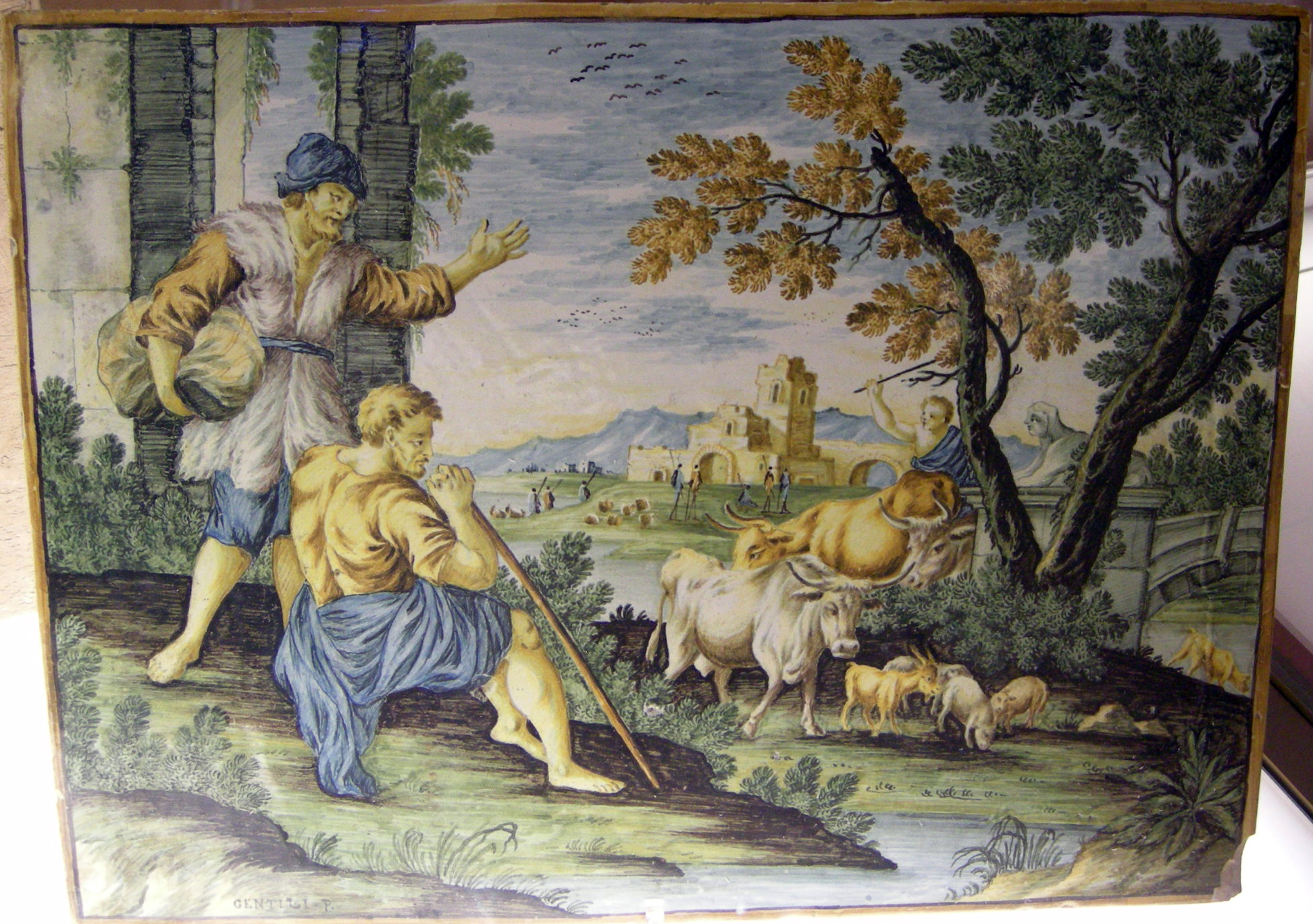 Palazzo Ducale di Urbino - Galleria Nazionale delle Marche - MIBAC This is a photo of a monument which is part of cultural heritage of Italy.